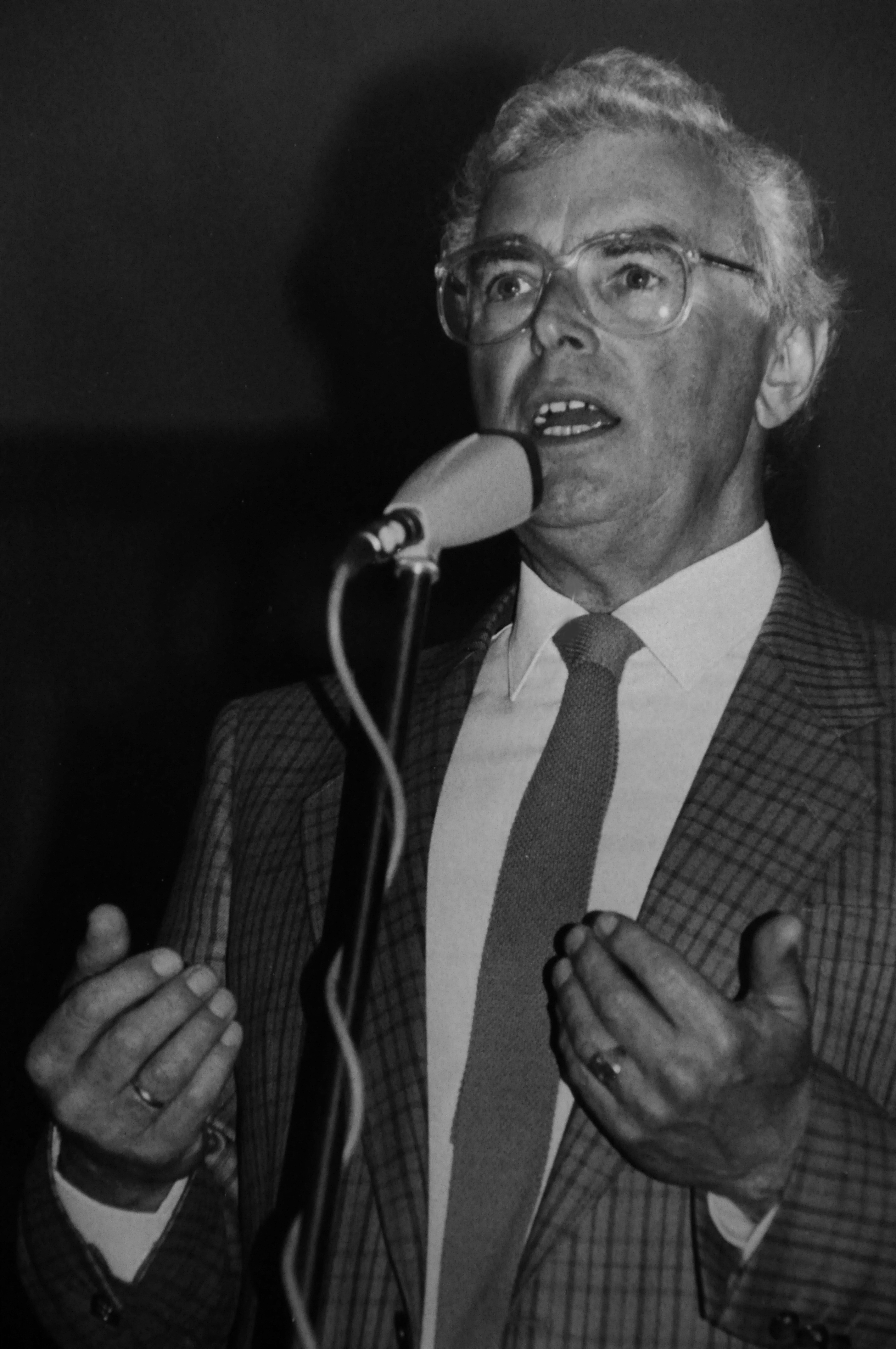 Afscheid Herman broekhuizen Bij de AVRO